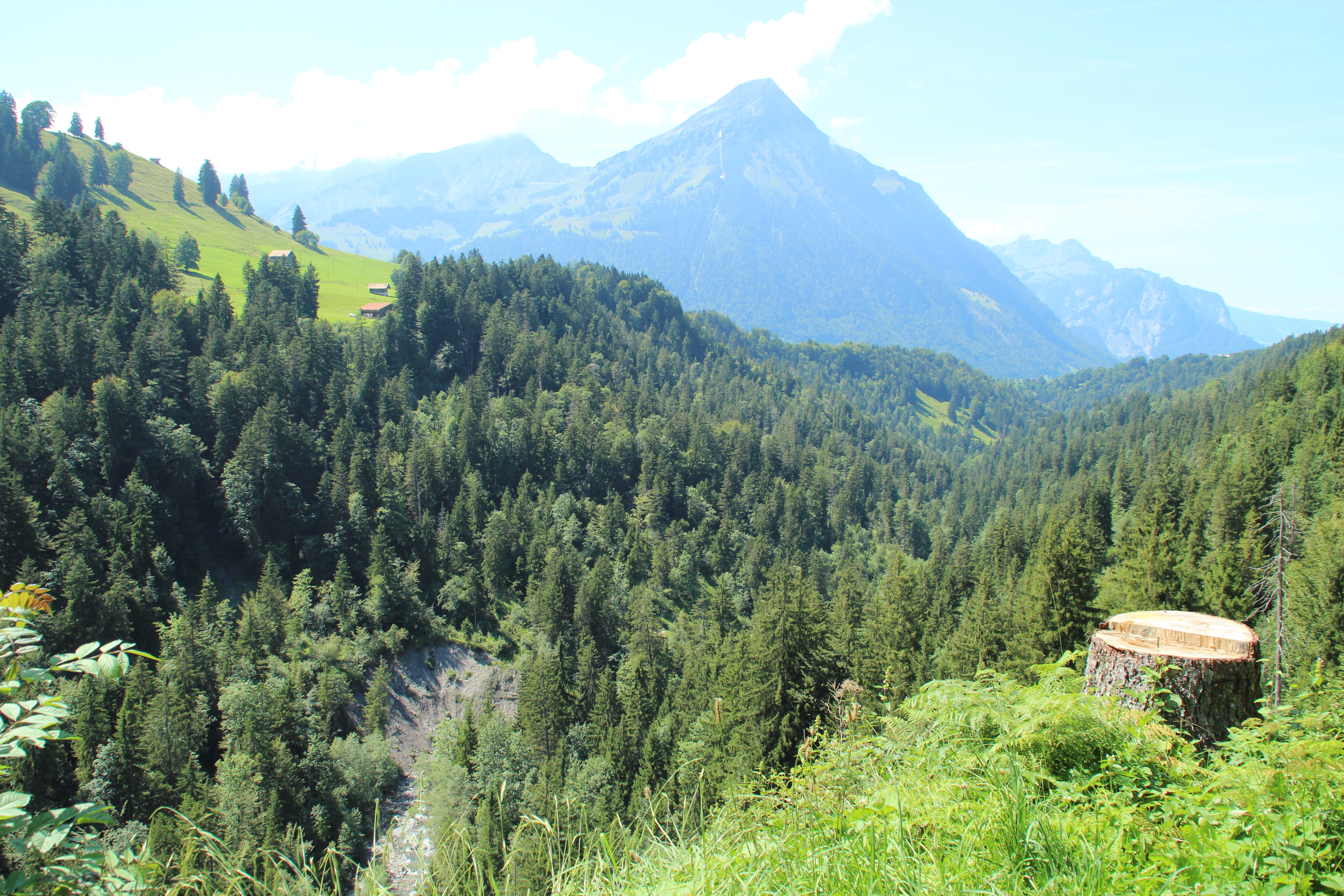 Suldtal